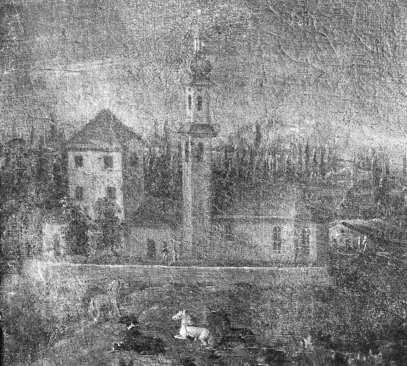 Mühlberg im Jahre 1770, Ölbild aus der Filialkirche St. Leonhard im Mühlberg